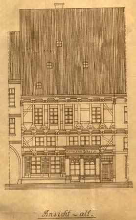 Zeichnung des Hauses Breite Straße 41 in Quedlinburg vor einem geplanten Umbau